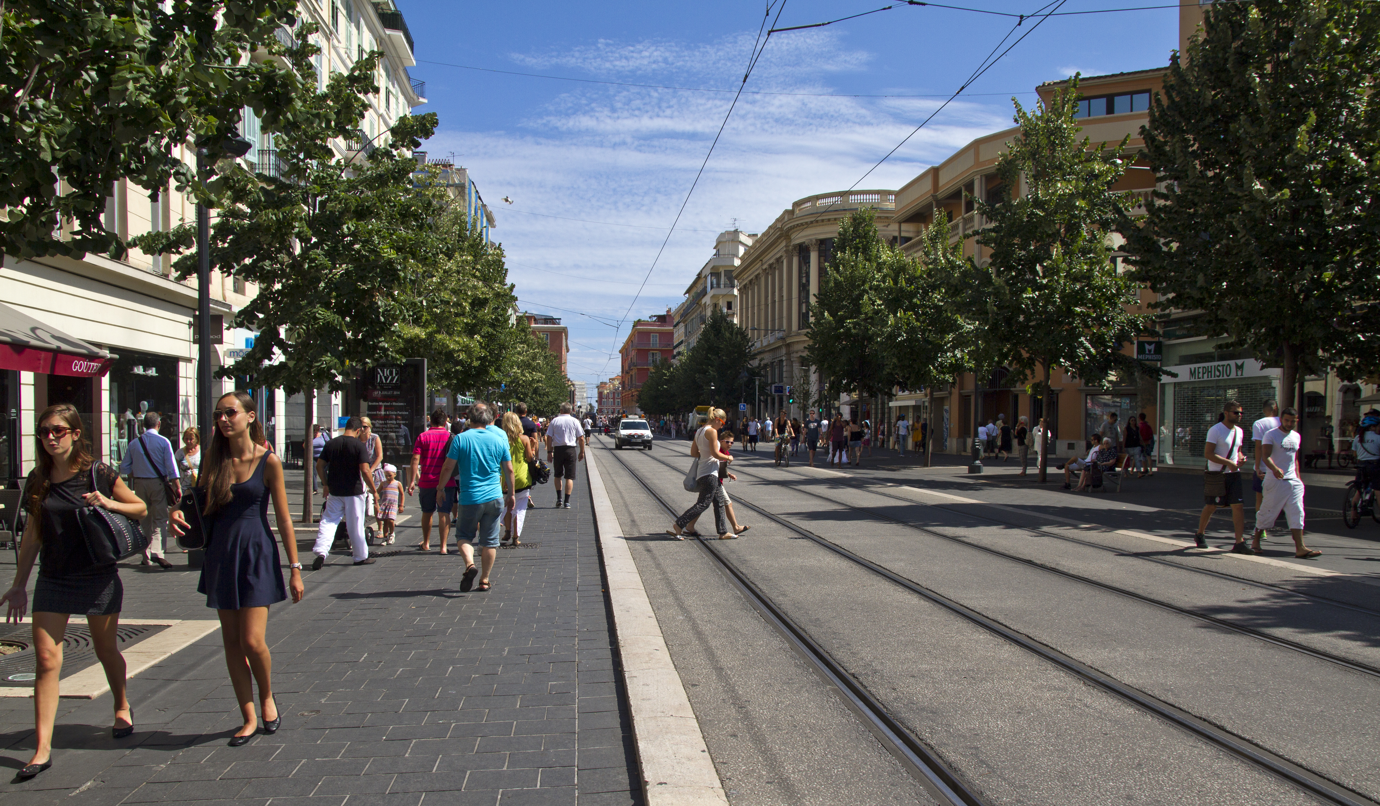 Av. Jean-Médecin, Nice, Provance-Alpes-Côte d'Azur, France